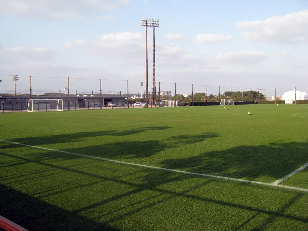 雁の巣球技場